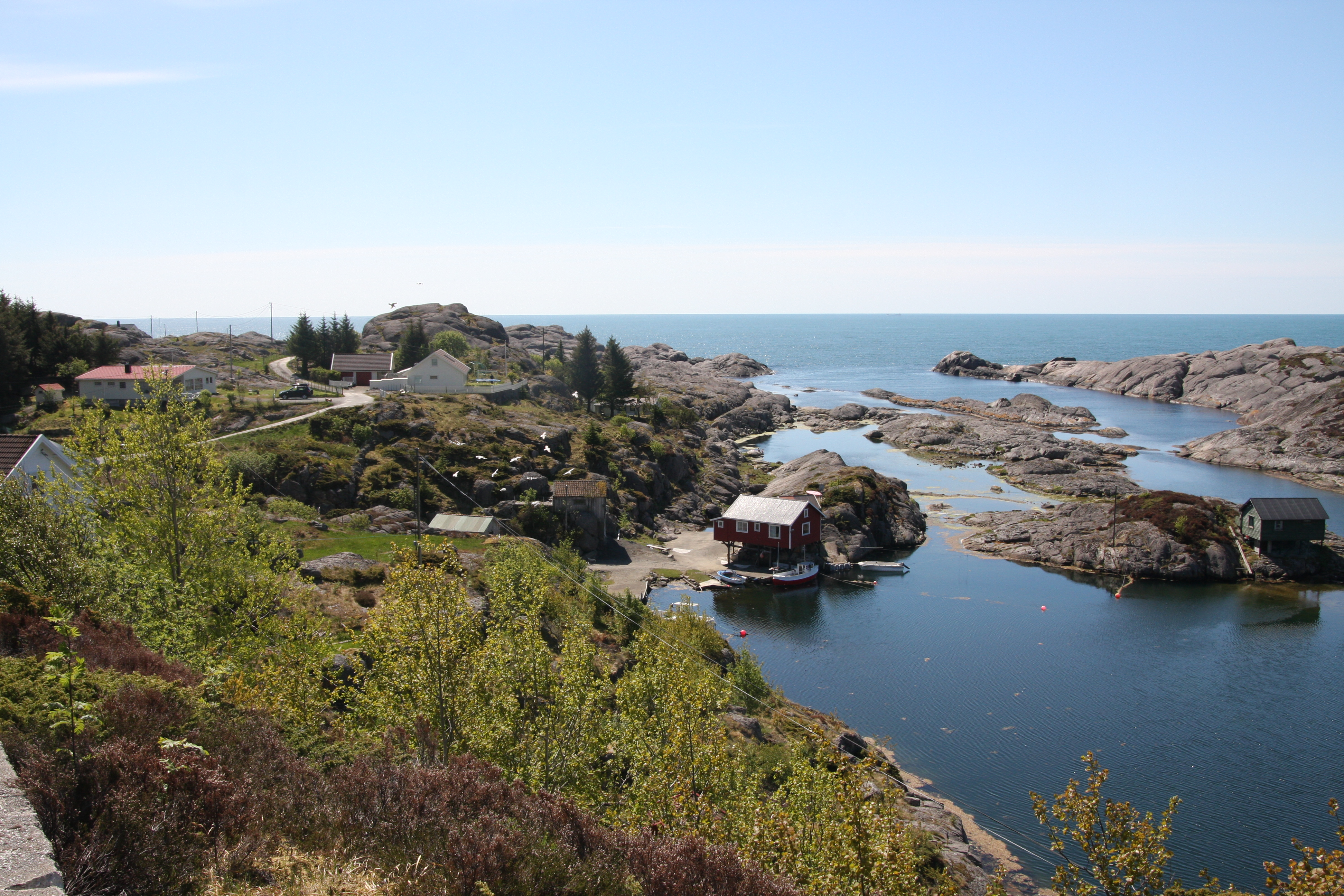 Mong